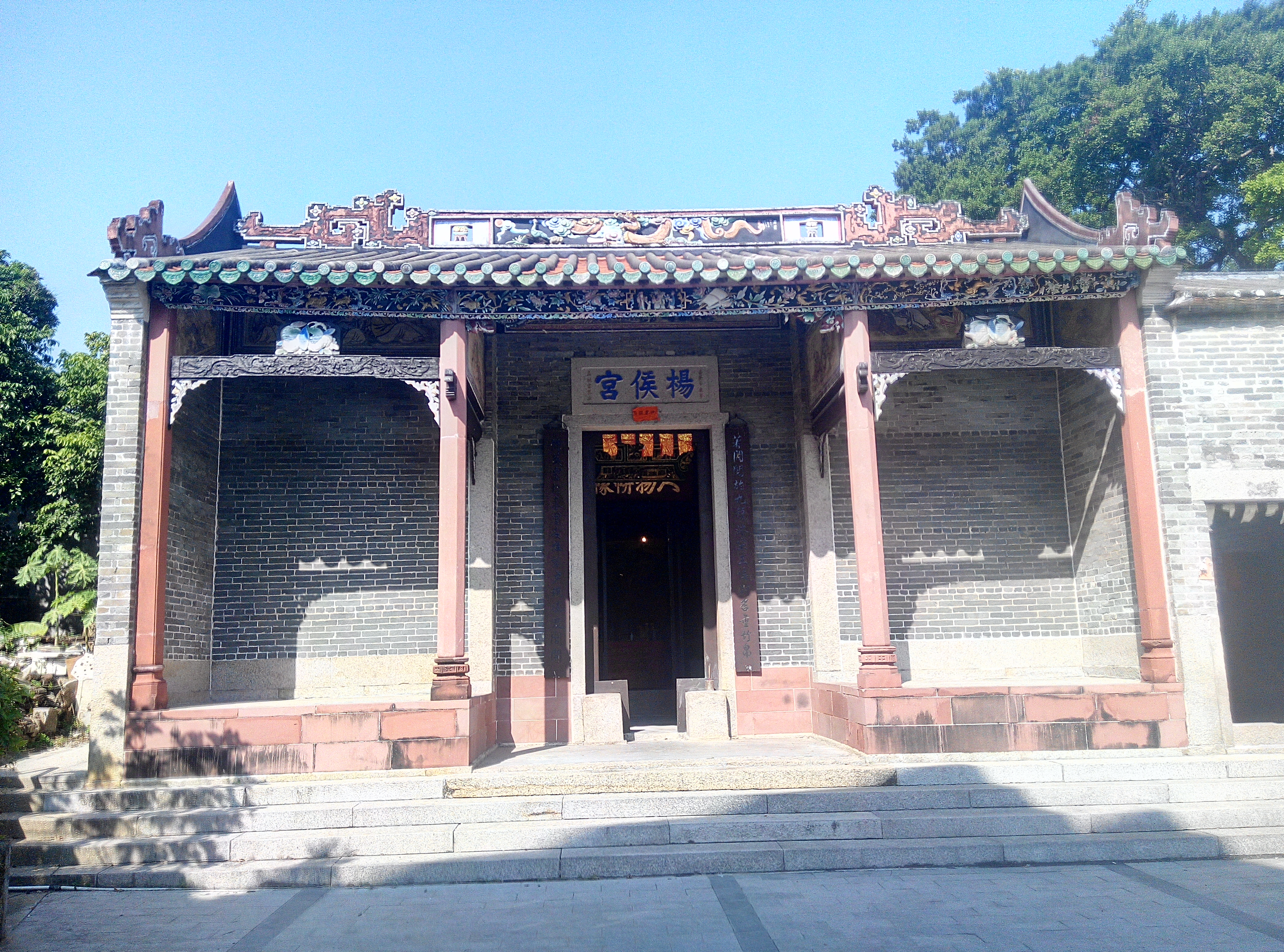 中文（香港）: 廈村東頭村楊侯宫